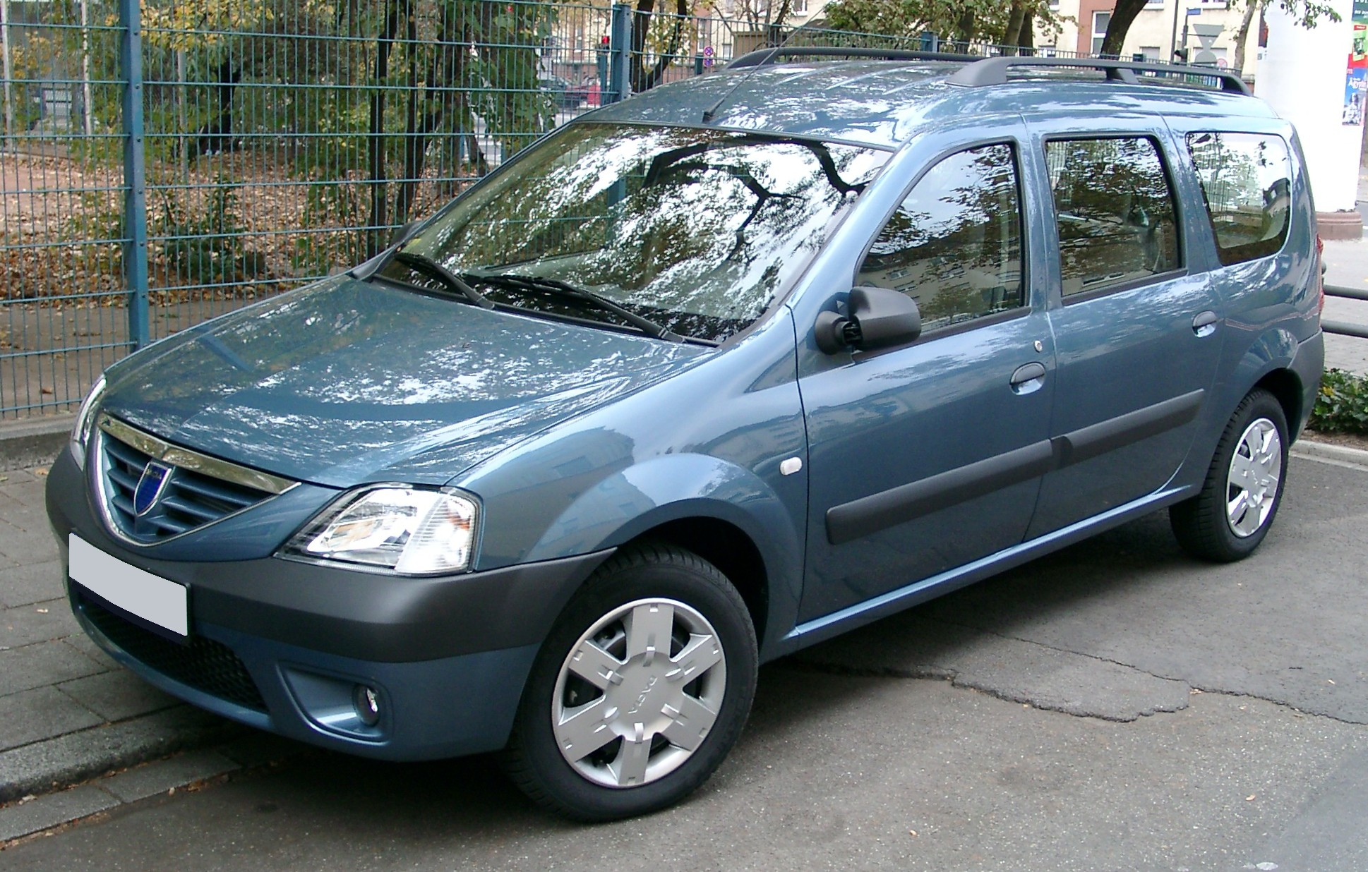 Dacia Logan Kombi